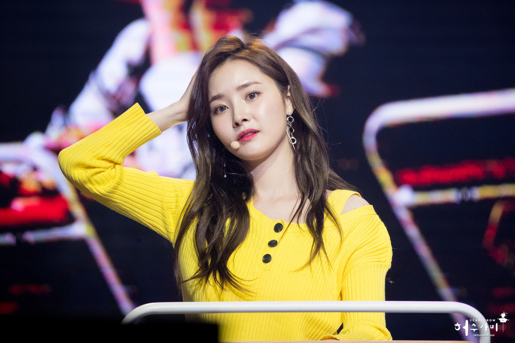 [18.03.03] 유니티 팬미팅 직찍 ( 유니티 더유닛 우희 윤조 )